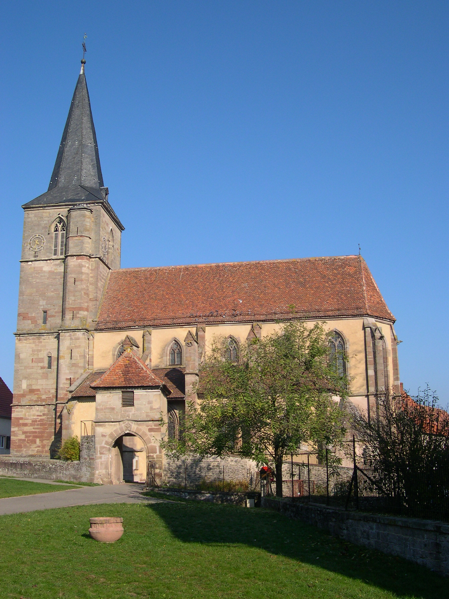 L'église fortifiée de Domfessel (Bas Rhin) est l’un des joyaux de l’art gothique alsacien. D'abord dédiée au culte catholique, elle devint église protestante au moment de la Réforme au XVIème siècle.